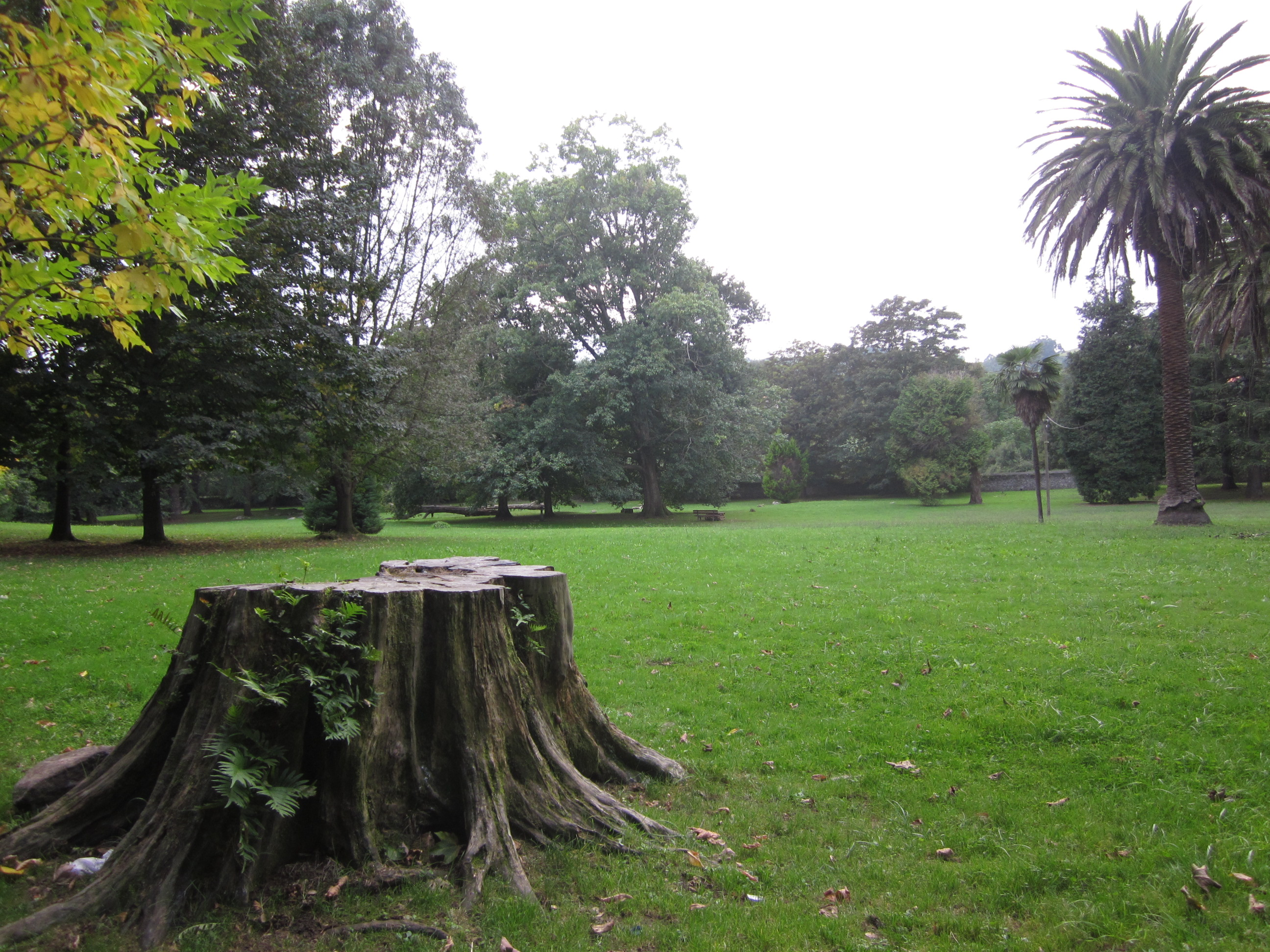 Finca de Riosequillo, vista del parque